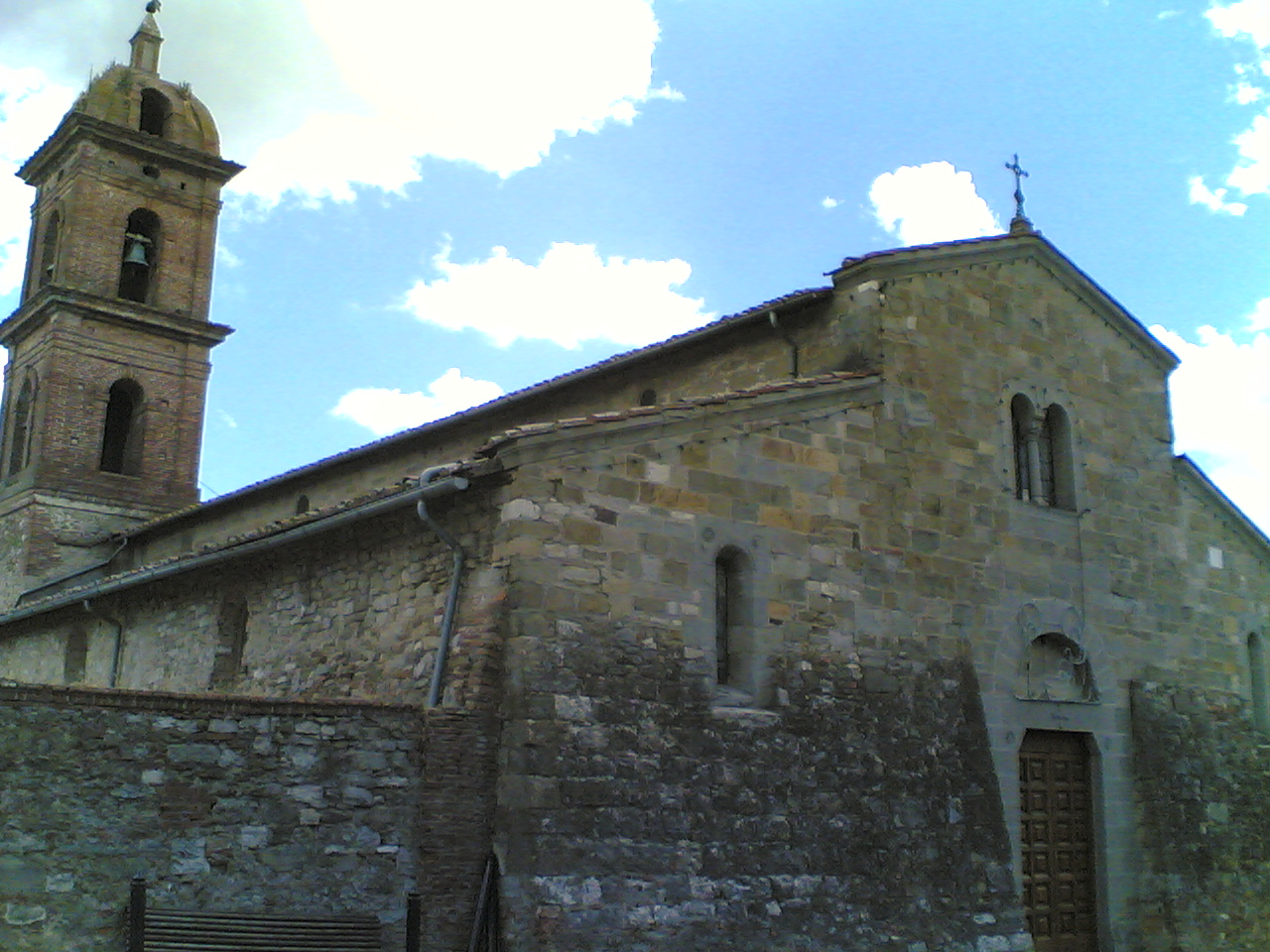 San Pietro Ad Mensulas church, Sinalunga (Siena, Italy)